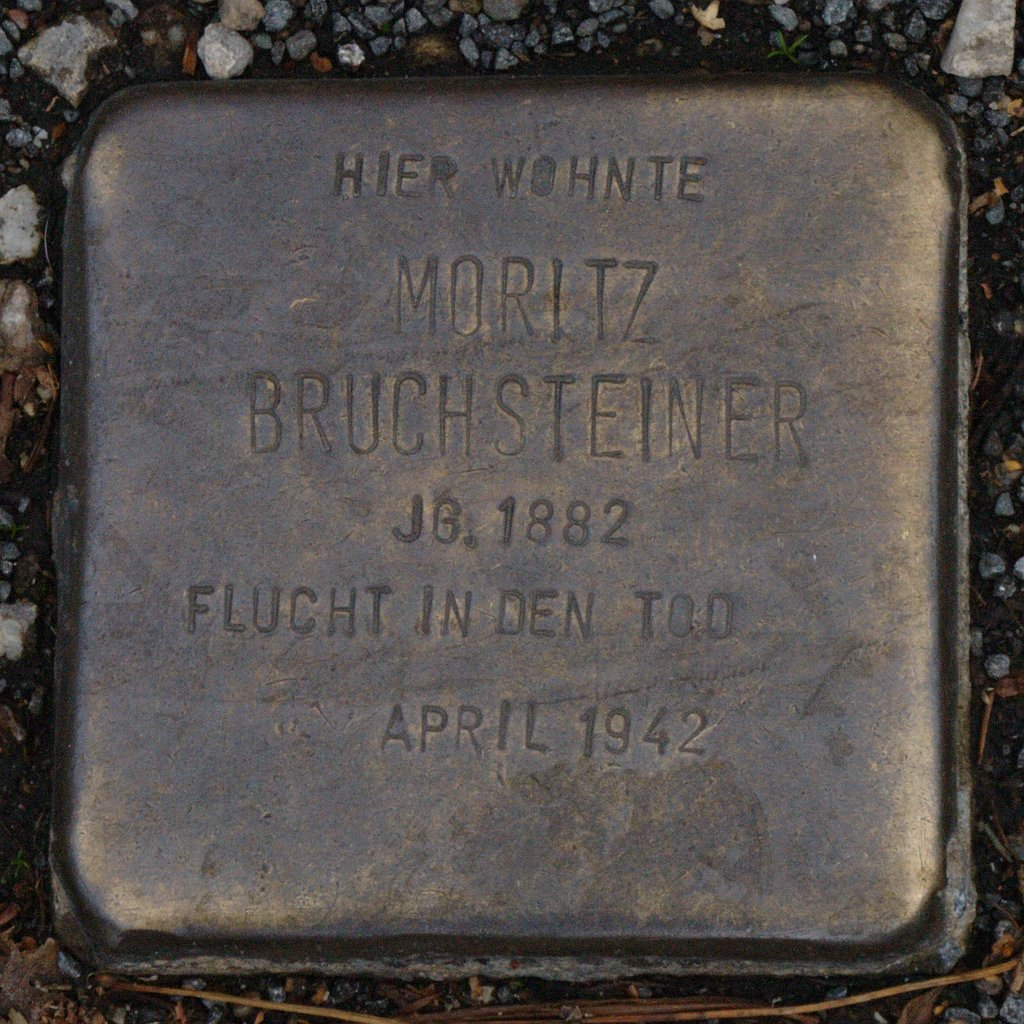 Stolperstein in Hattingen Moritz Bruchsteiner